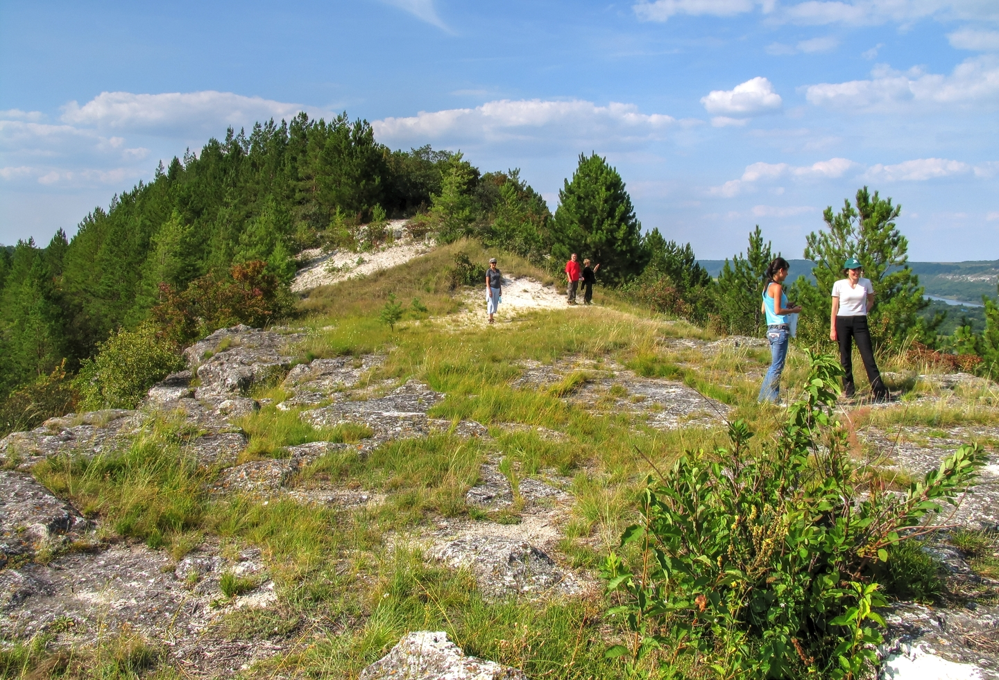 Холм «Каска», монумент природы, находится в Сорокский район, Западнее с. Кременчуг, с. Кремчуг, Отачское лесничество, урочище Кременчуг-II, квартал 49, выделы 18, 26, 29, 30 (код MD-SR-mn.A-070) A-070